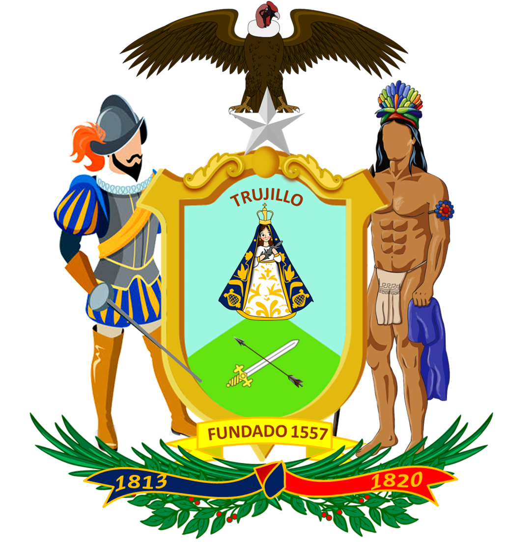 TRUJILLO VENEZUELA